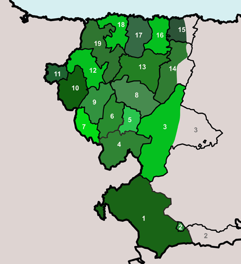 Mapa onde se sinalan os concellos da Terra do Eo-Navia dentro do dominio lingüístico galego e galego-portugués en xeral.